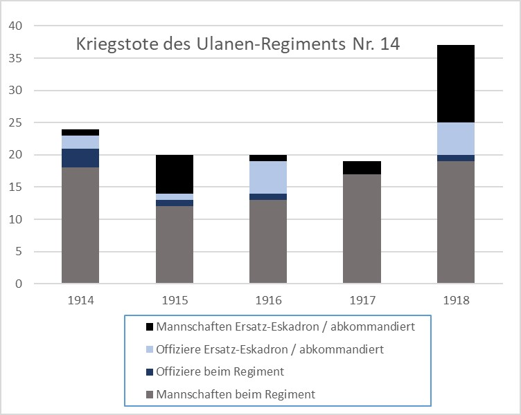 Kriegstote des Ulanen-Regiments Nr. 14 während des Ersten Weltkriegs. Die Verlustzahlen stammen aus Fritz von Mackowsky: Geschichte des 2. hannoverschen Ulanen-Regiments Nr 14. Bremen 1932.